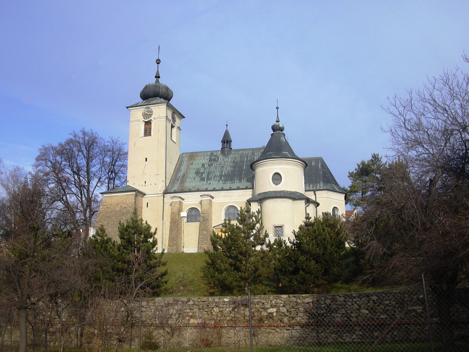 Kostel sv. Vavřince / St. Lawrence Church, Drnovice 09 (Vyškov District, Czech Republic)